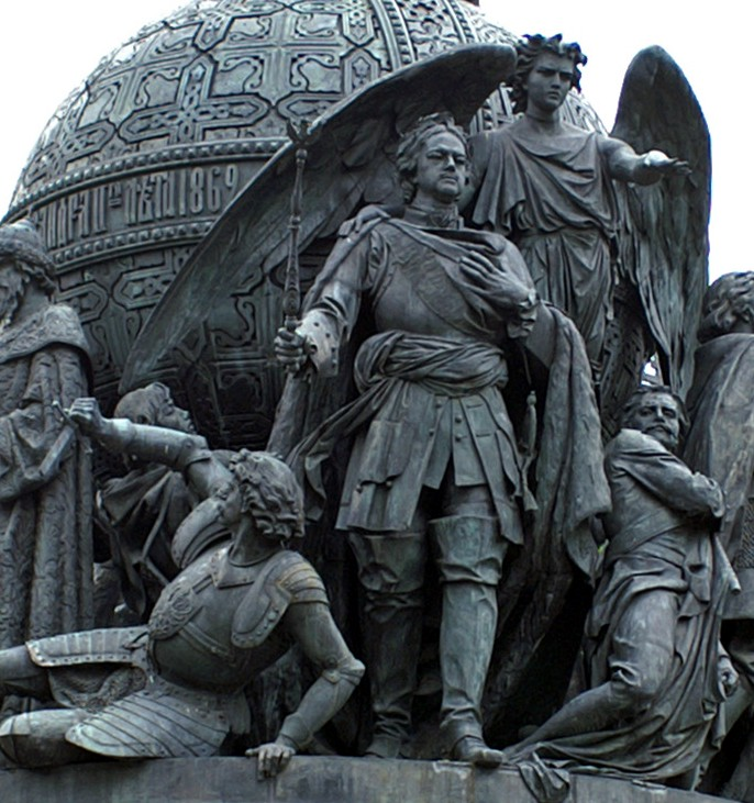 "Тысячелетие Руси" (деталь) Образование Российской империи (1721 год): Пётр I в порфире, увенчанного лавровым венком со скипетром в правой руке I и Гений-крылатый ангел, указывающий путь на север, к месту будущего Санкт-Петербурга. У ног Петра поверженный на колени швед, защищающий свое разорванное знамя (обращены на север, к Петербургу). Трёхфигурная группа выполнена скульптором И. Н. Шредером. Peter I and Genius